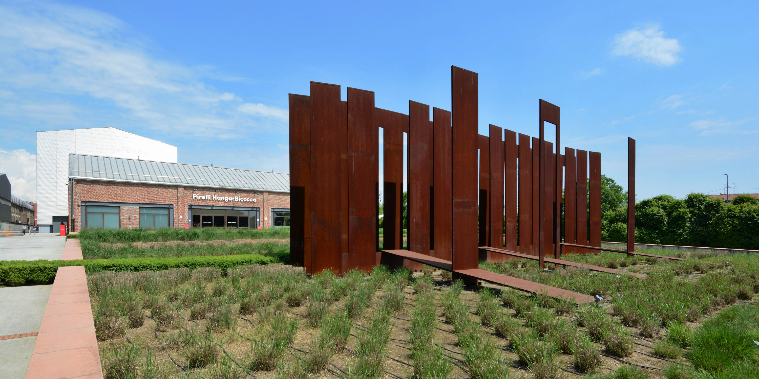 Faust Melotti: Sequence (1981), Pirelli HangarBicocca, Milán